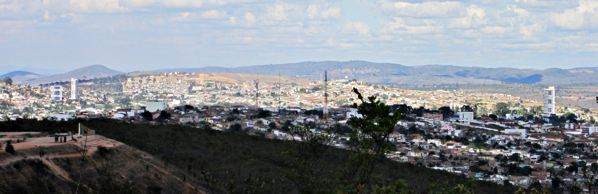 Garanhuns - Pernambuco - Brasil